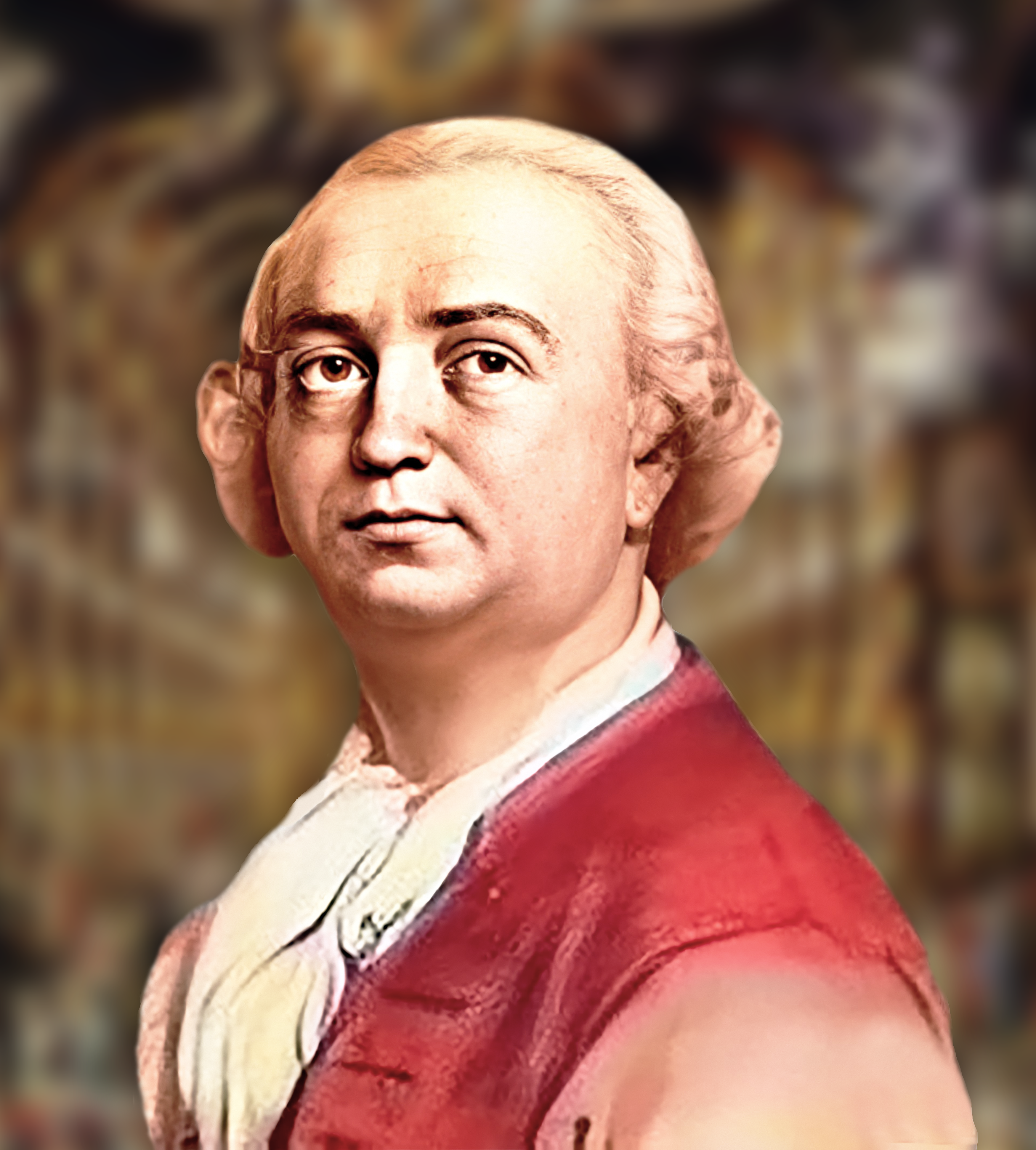 французский хореограф, танцовщик и педагог